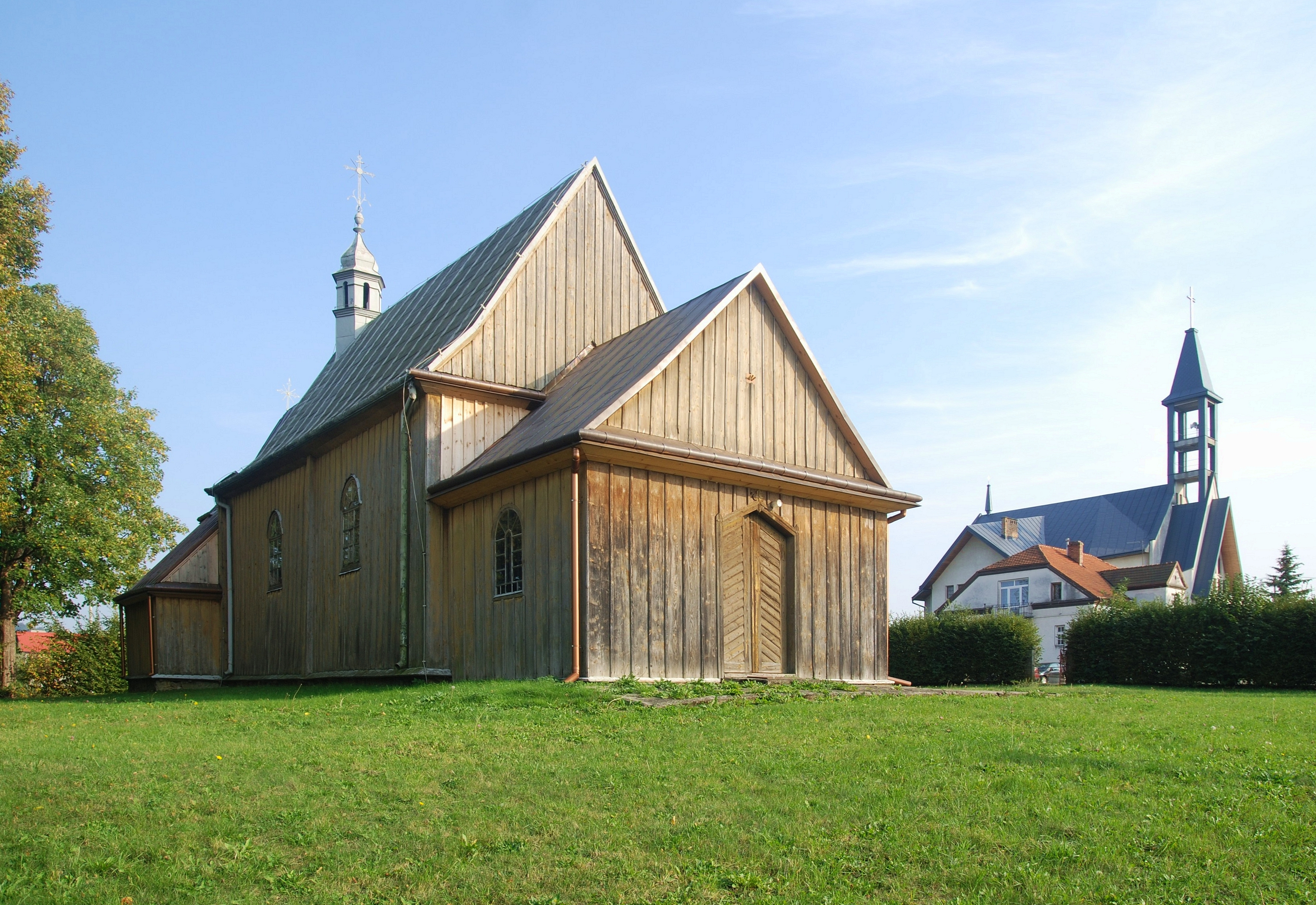 kościół